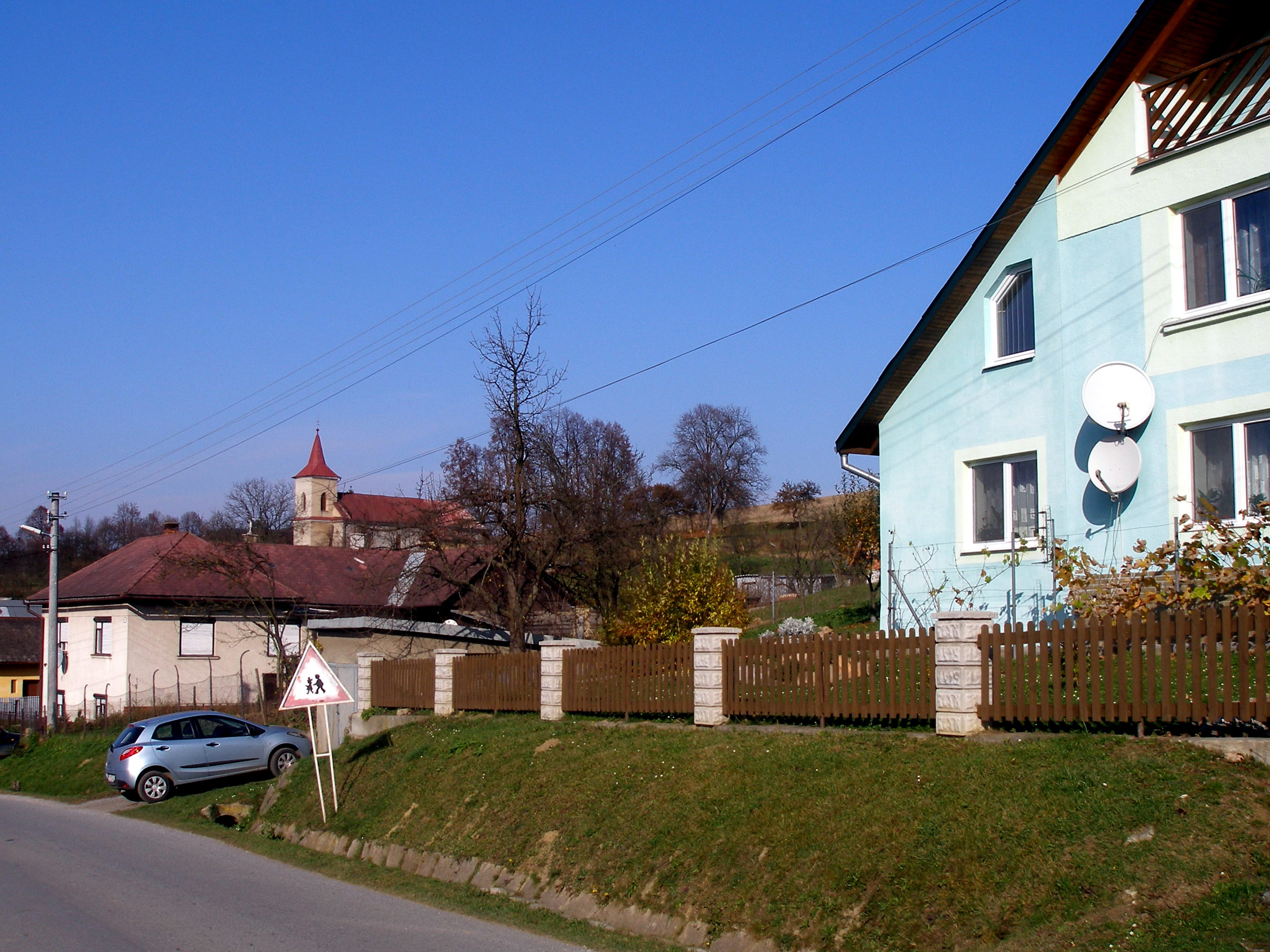 Obec Sedlice okr.Prešov, región Šariš